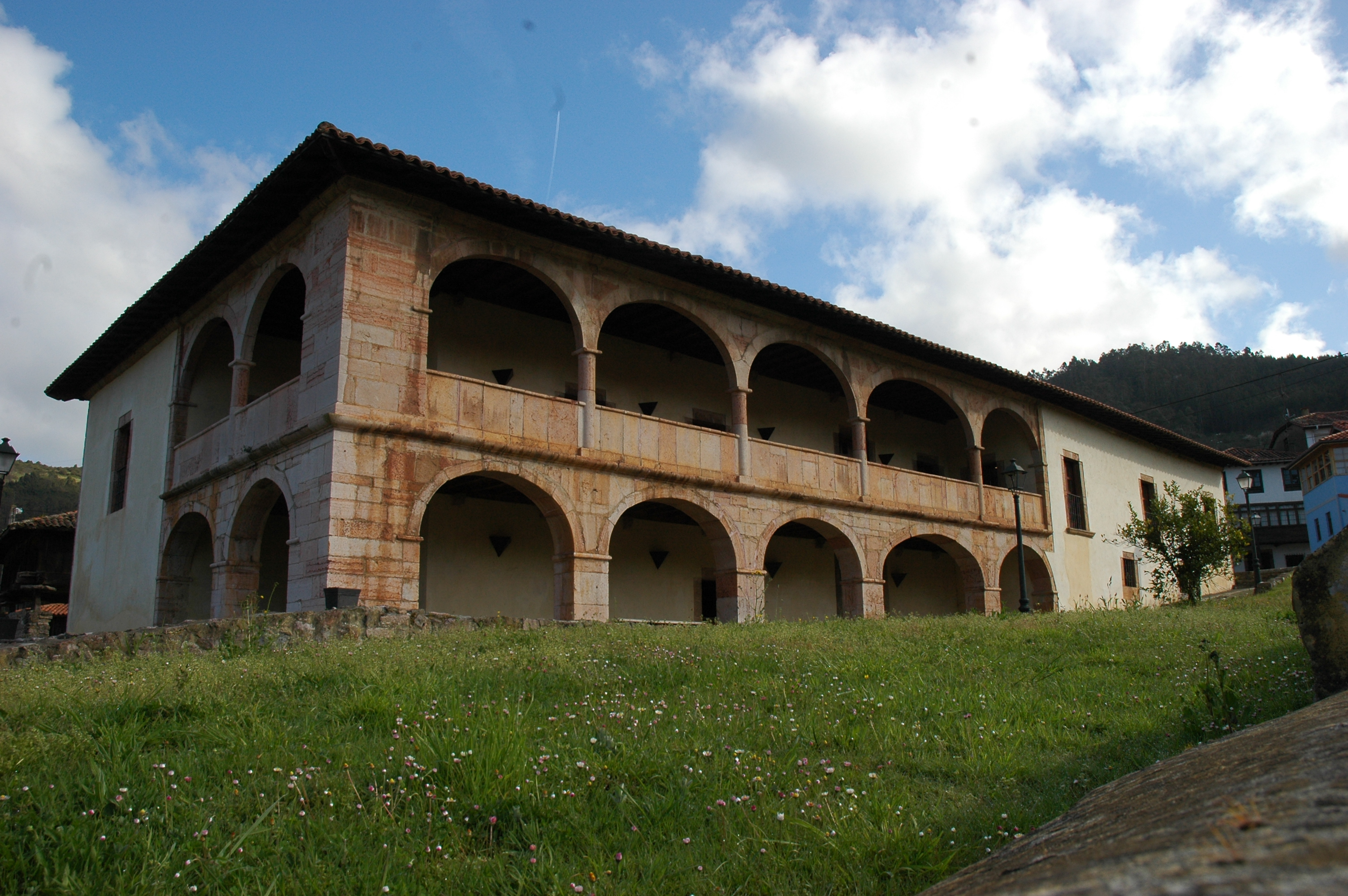 Palaciu de Valdés-Bazán (sieglu XVIII), en San Román de Candamu. Ye la sé del Centru d'Interpretación de la Cueva de Candamu.